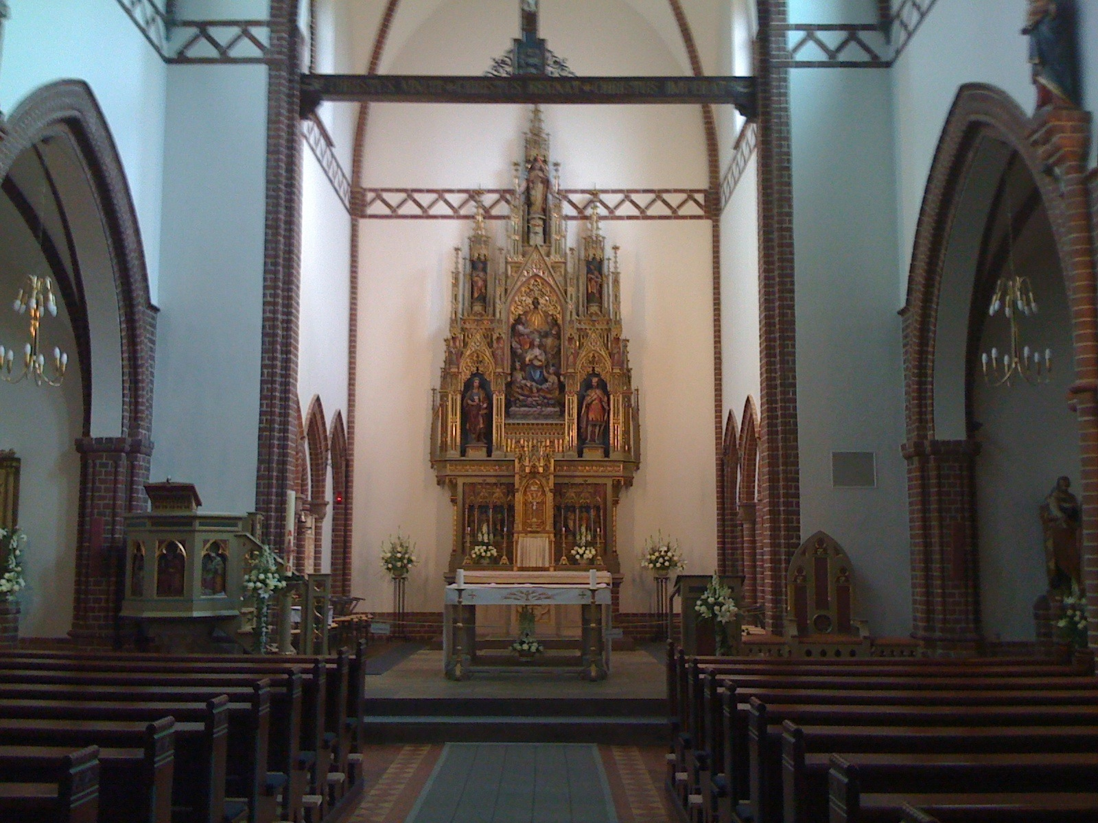 Sankt Albani Kirke i Odense, Danmark, hvor kong Knud Svendsøn (ca. 1043-1086) måtte lade livet 10. juli 1086 under en bondeopstand. Kongen blev ophøjet til helgen primært som følge af drabsstedet — i Guds eget hus, knælende foran alteret. Foto: Erik Thau-Knudsen, 2010-05-06